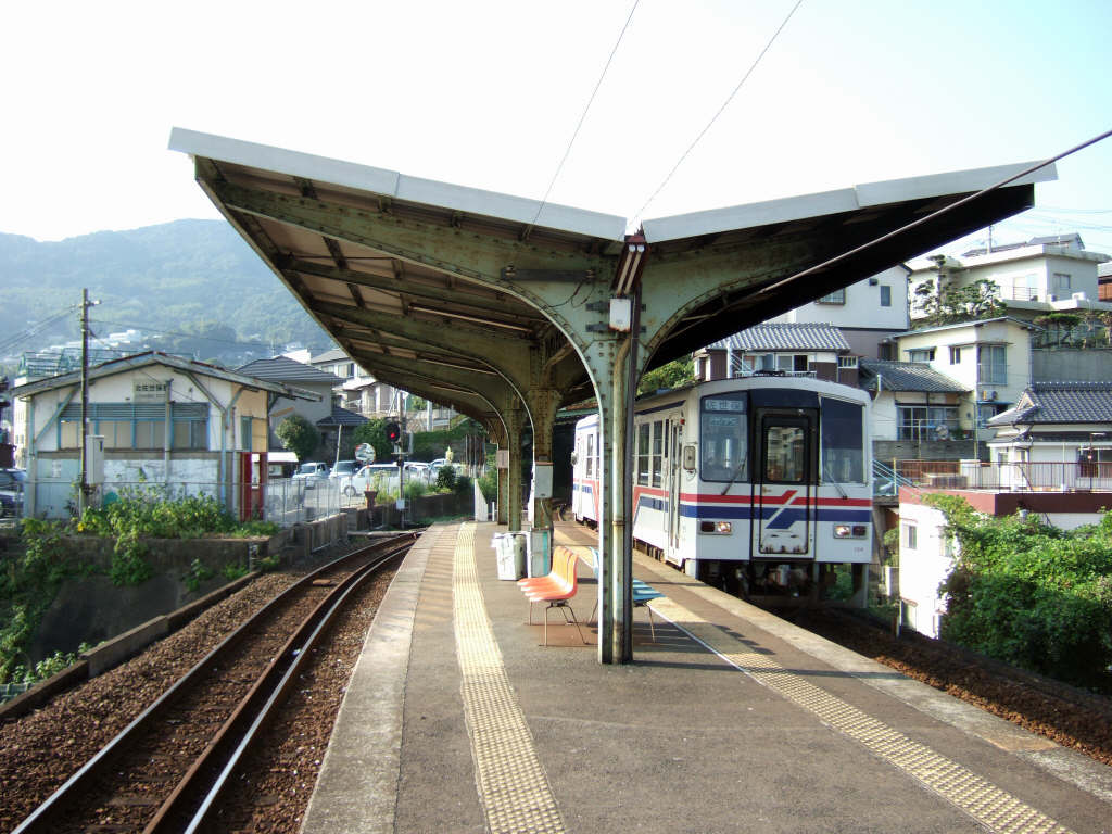 松浦鉄道北佐世保駅